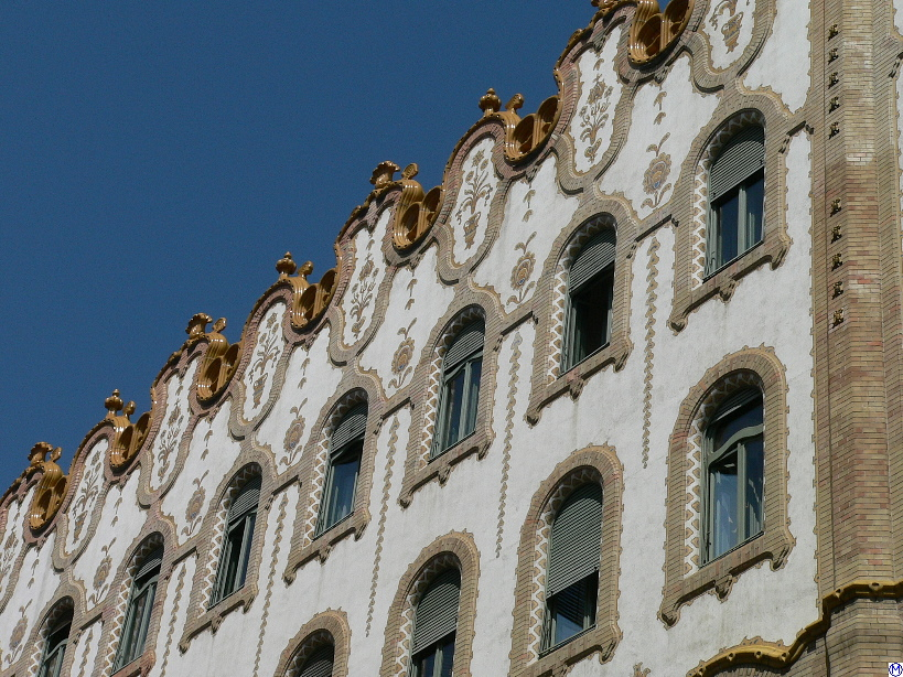 Budapest: Details an der Postsparkasse (5.2006) Architekt: Ödön Lechner